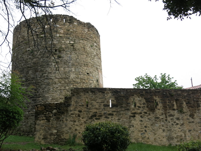 Castell de Cos o de Montagut a la Garrotxa - Catalunya